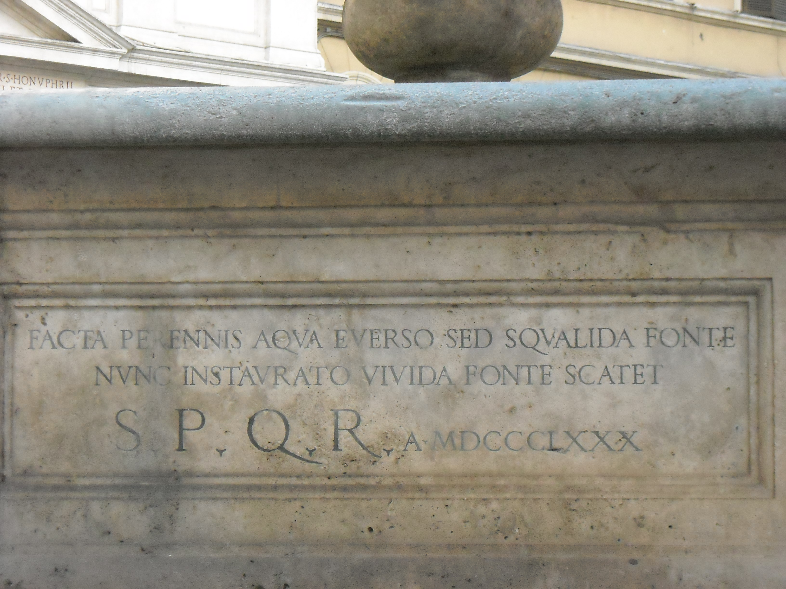 Fontana di piazza Madonna dei Monti - Iscrizione commemorativa restauro